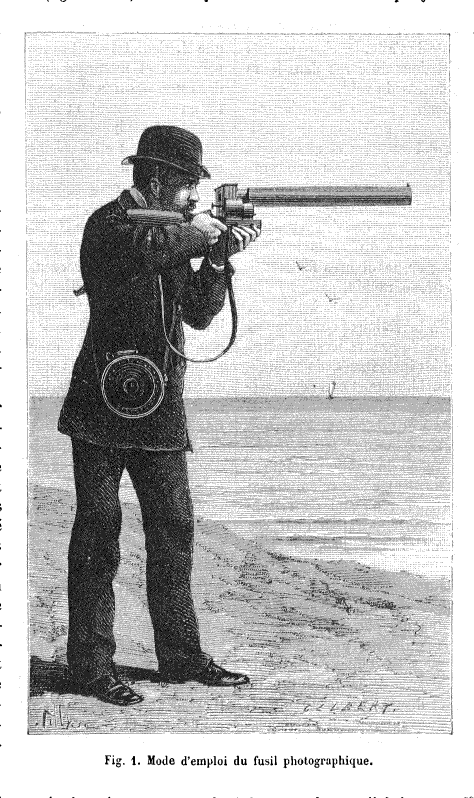 Le Fusil photographique, article d'Étienne-Jules Marey paru dans la Nature n°464 du 22 avril 1882